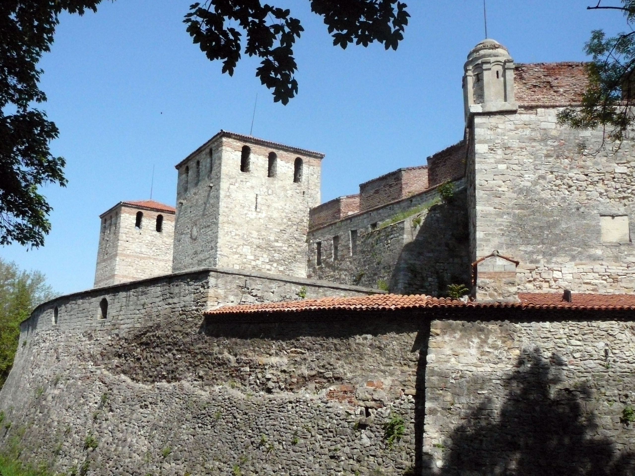 Baba Vida Fortress,Vidin,Bulgaria